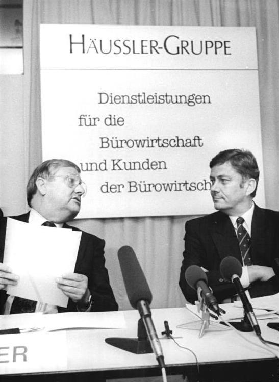 7.6.90-wü- BRD: Unternehmer Berghofer- Der Ex-OB Dresdens, Wolfgang Berghofer (r) wurde am 6.6. als Generalbevollmächtigter der Häussler-Gruppe für die DDR durch Rudolf Häussler vorgestellt. Das Dienstleistungsunternehmen für Bürowirtschaft aus Stuttgart will Richtung Ost expandieren. Links: Senator h.c. Rudi Häussler.